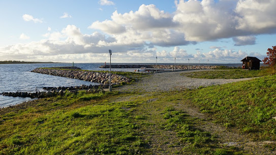 Le bord de mer d'Atla (Estonie)